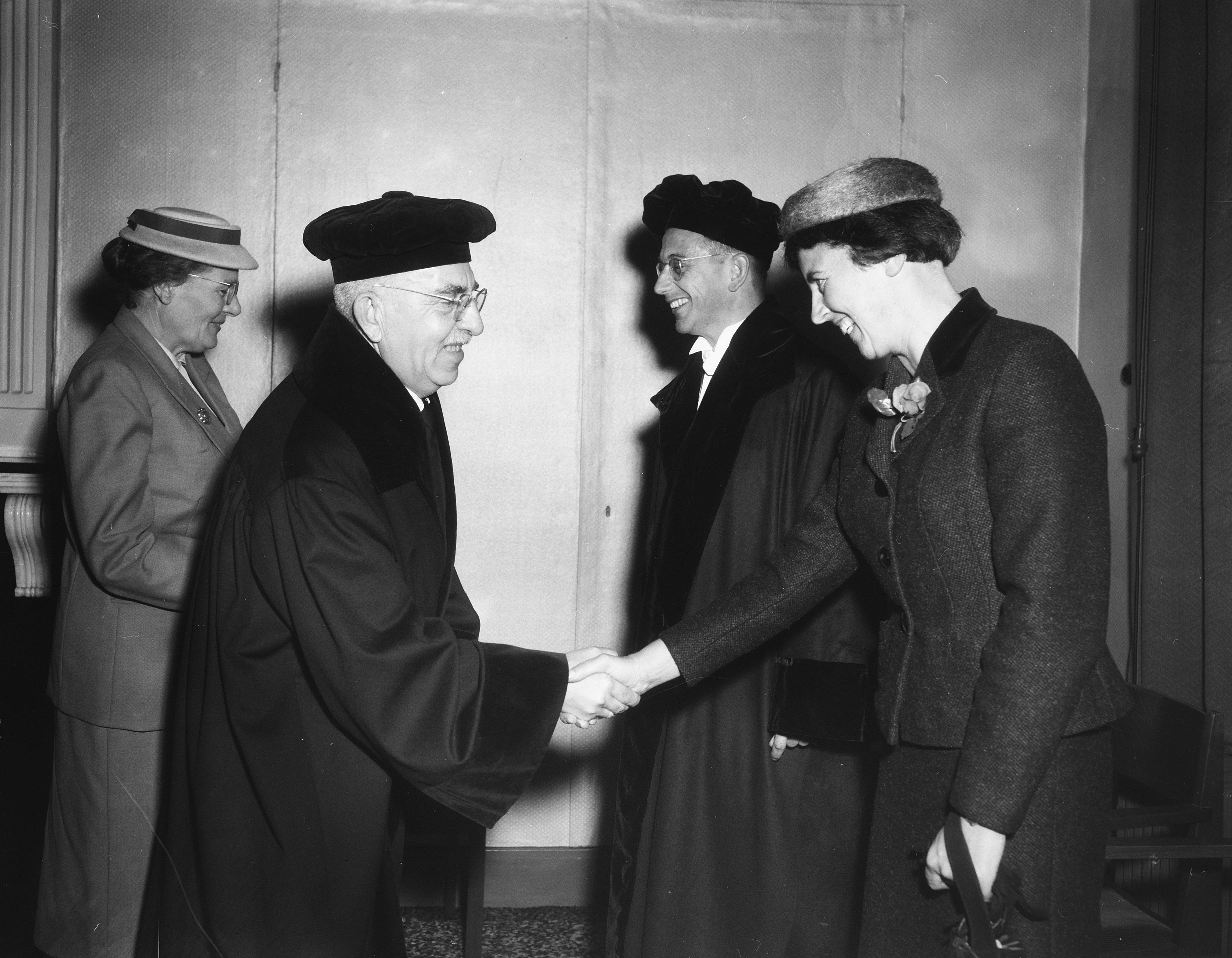 Karel van het Reve benoemd tot gewoon hoogleraar Russische taal- en letterkunde aan de Rijksuniversiteit Leiden. Zijn oratie vond plaats op 18 oktober 1957. De rector magnificus, prof. dr. Samuel Elzevier de Jongh, feliciteert de kersverse hoogleraar. Rechts op foto de vrouw van de hoogleraar Van het Reve, J(ozien) van het Reve-Israel. Datum 18 oktober 1957